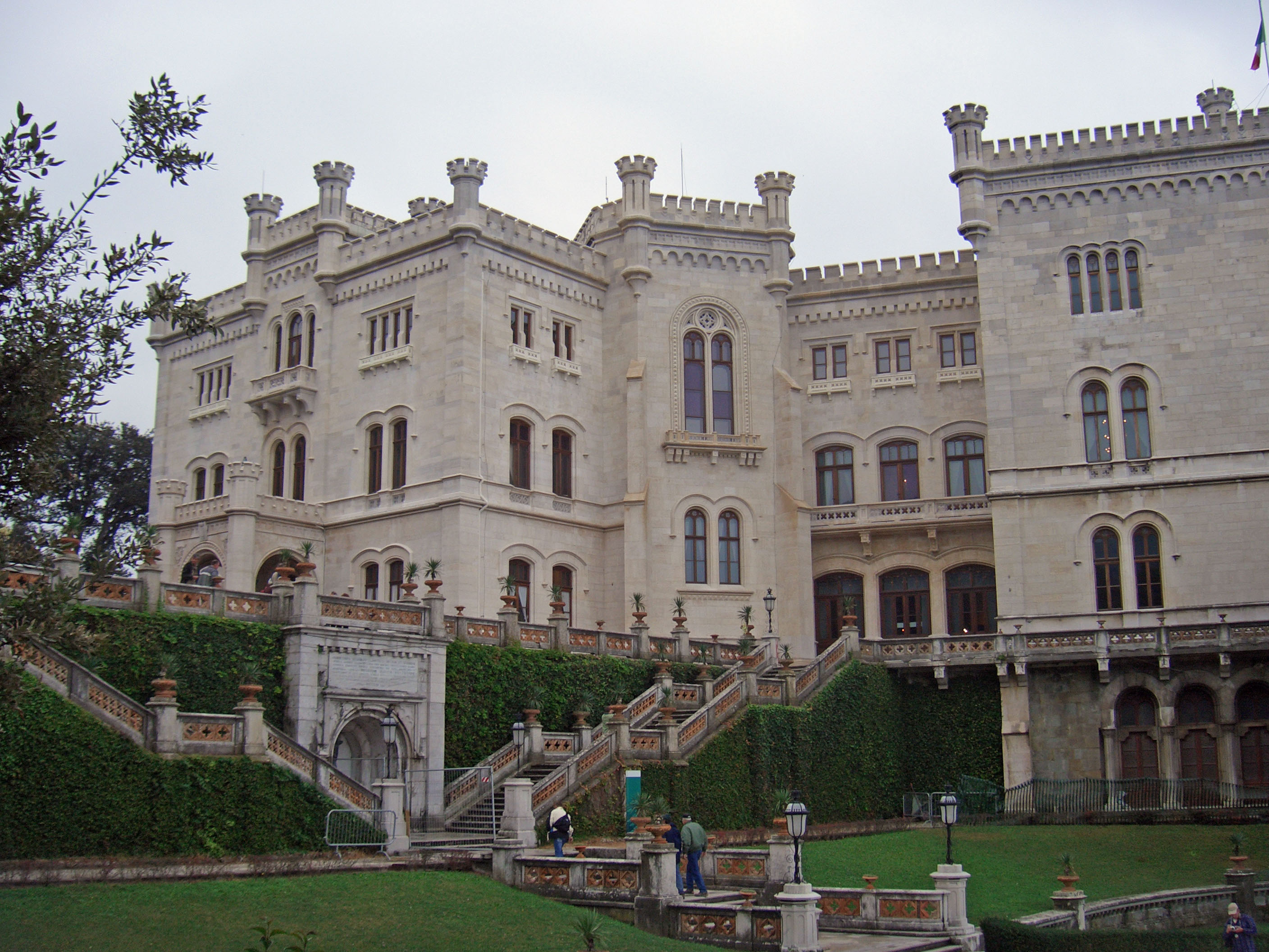 Grad Miramar